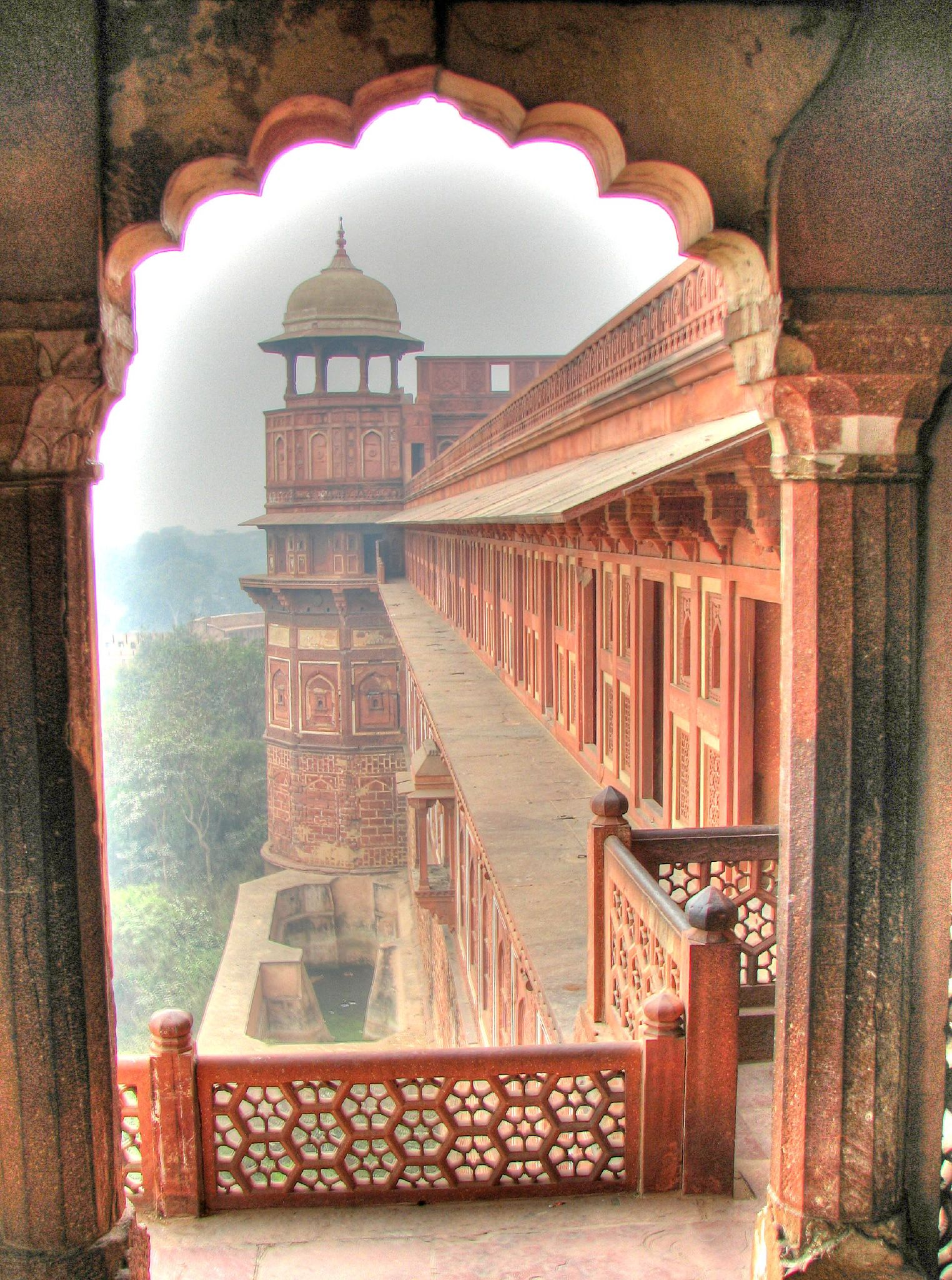 Agra Fort 15 HDR